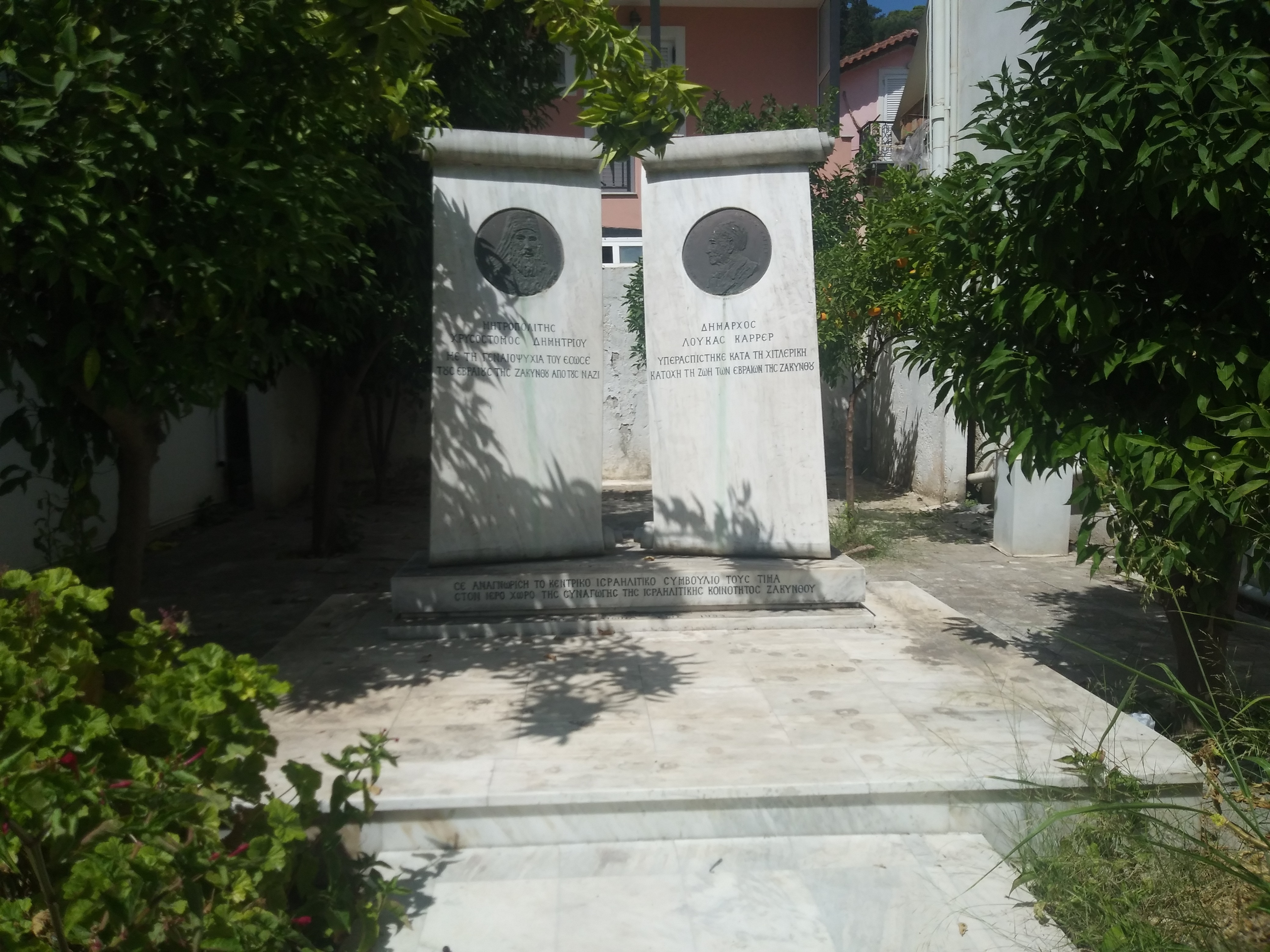 אנדרטותייהם של מצילי היהודים בזקינטוס